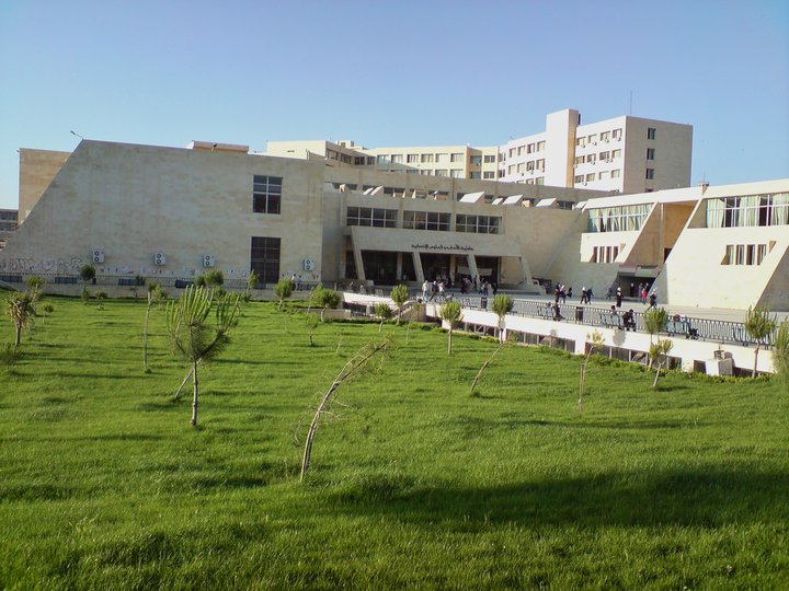 مبنى كلية الآداب والعلوم الانسانية لجامعة حلب- سوريا